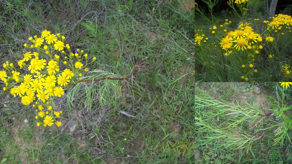 Senecio brasiliensis. Asteraceae. Fotos tomadas al margen de la Ruta 81 sobre suelo húmedo en Abras de Zabaleta, departamento de Lavalleja, Uruguay.